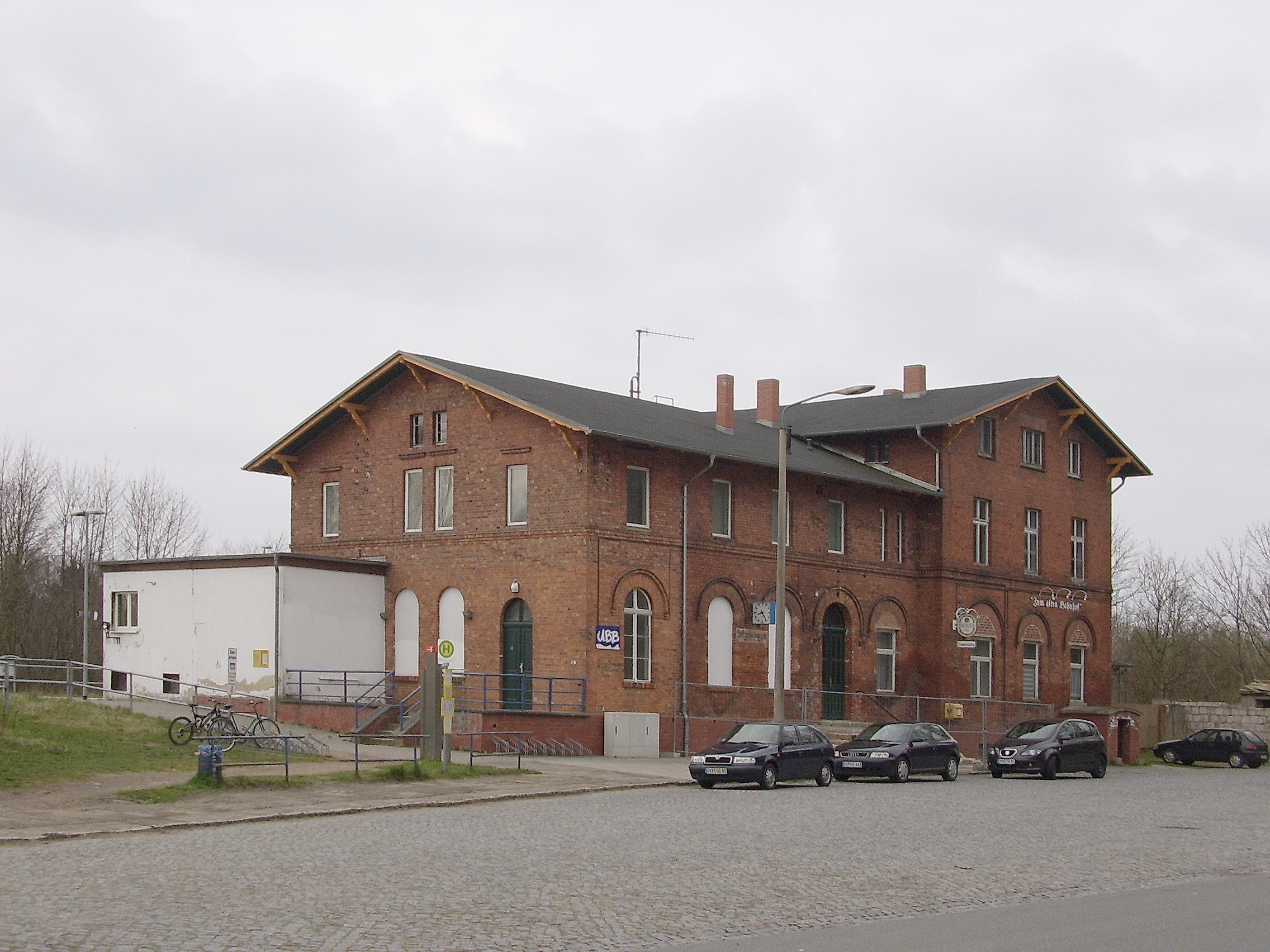 Воказал Вольгаста 54° 2'40.19"N 13°46'6.83"E